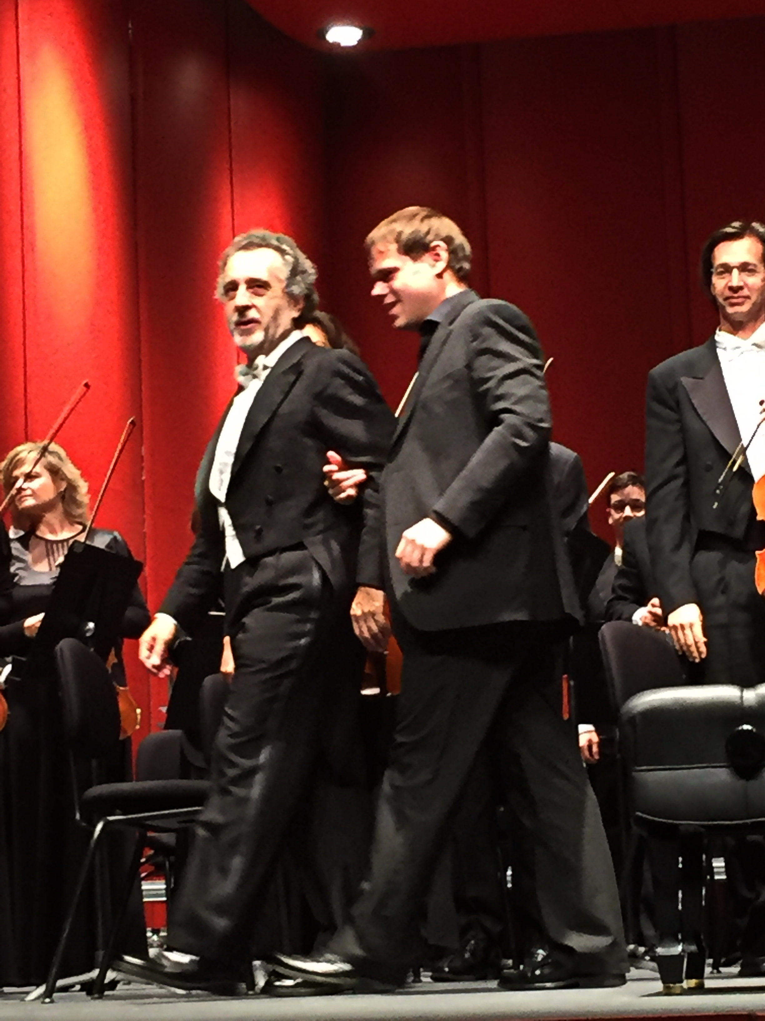 Josep Pons i VIladomat, director musical del Gran Teatre del Liceu, acompanyant al pianista Ignasi Cambra